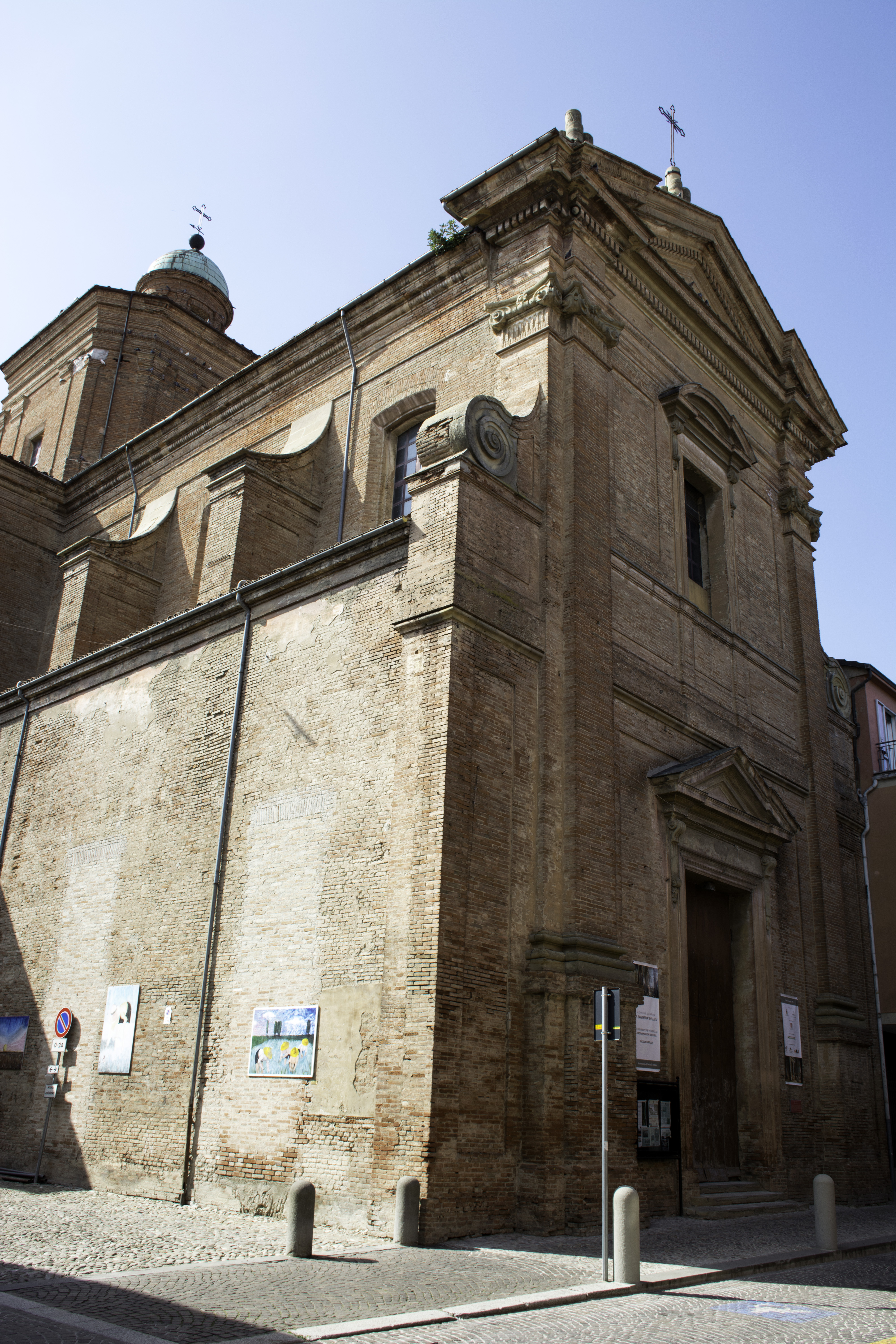 ex chiesa del Carmine This is a photo of a monument which is part of cultural heritage of Italy.